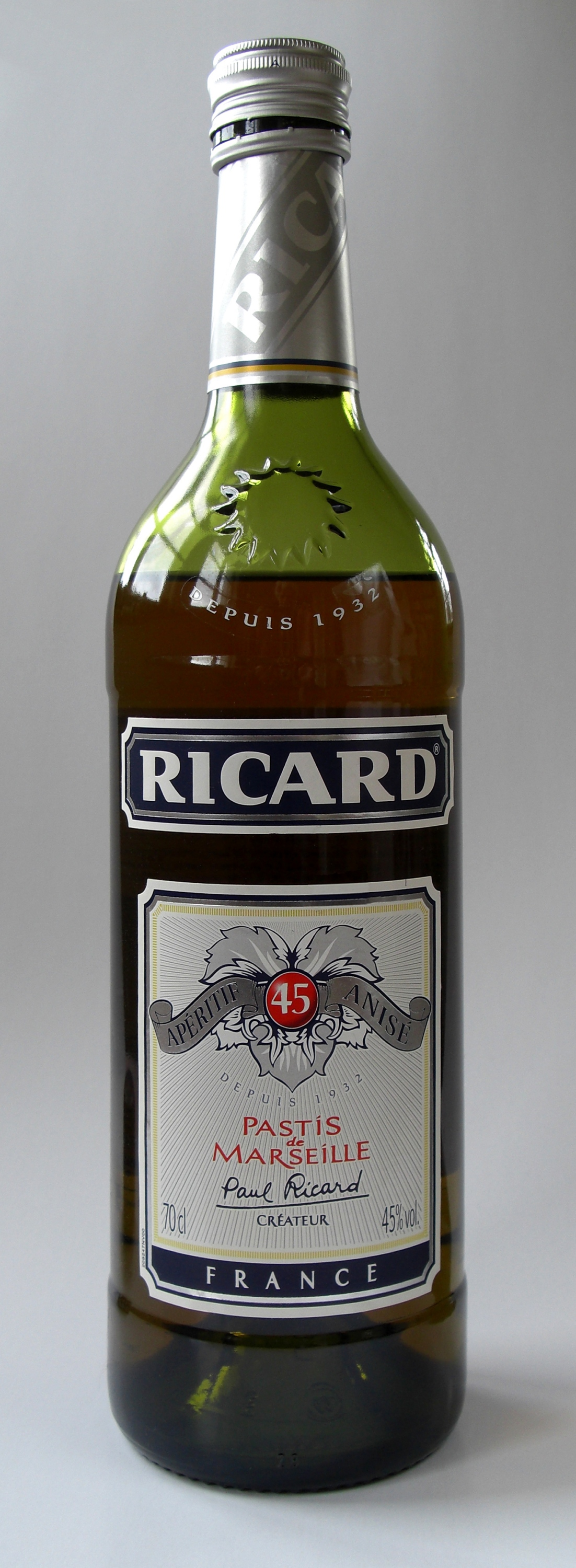 See title